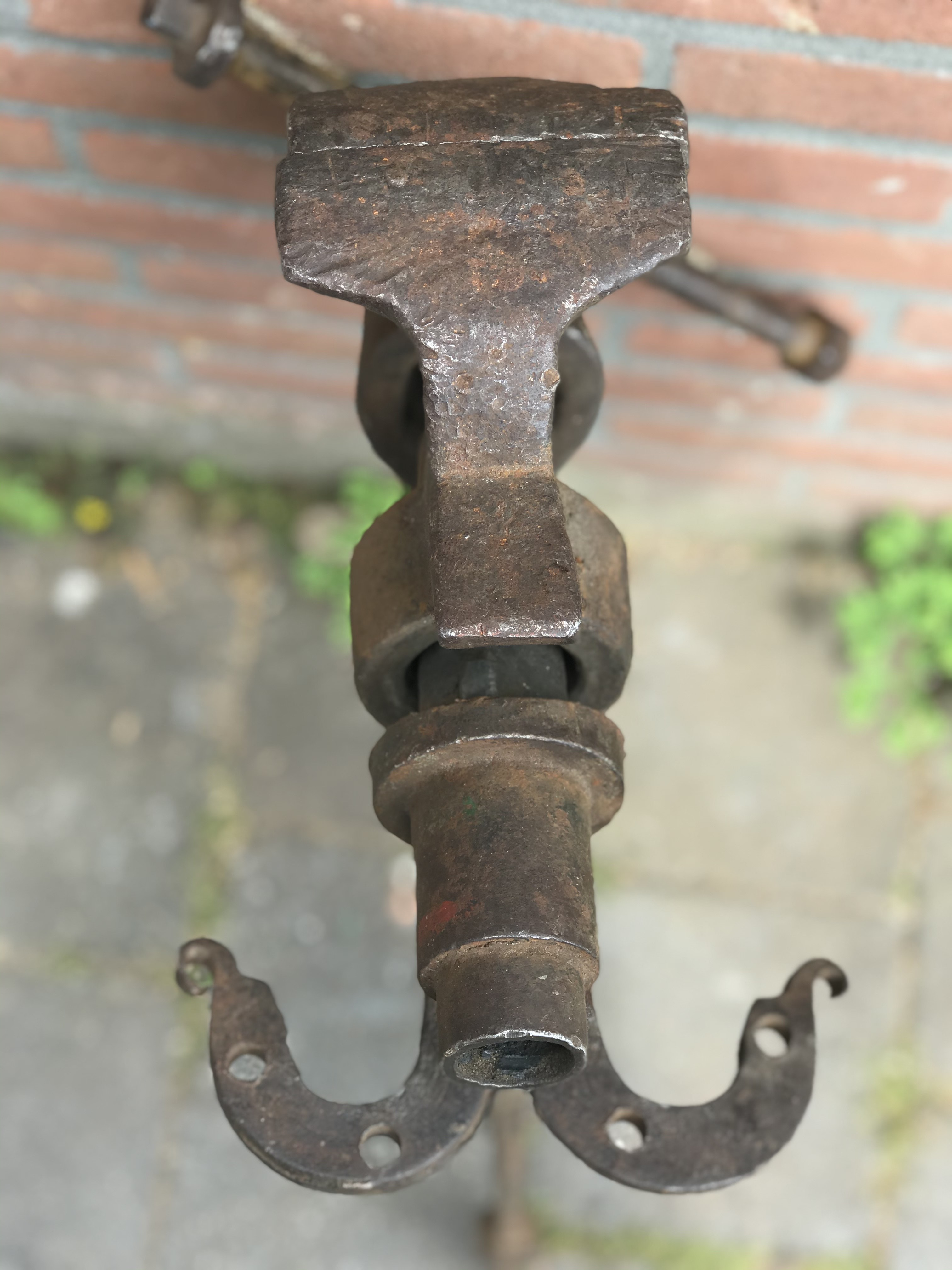 De staartbankschroef wordt met deze steun aan een draagvlak bevestigd. (Zoals een werkbank)